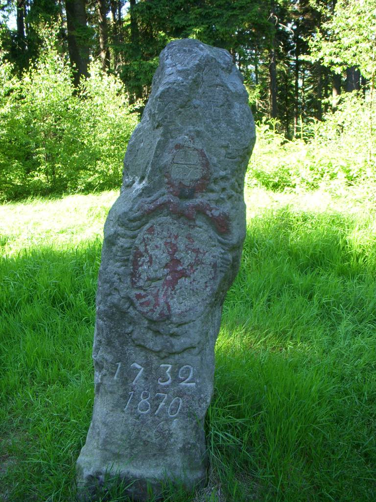 Trójpański Kamień.